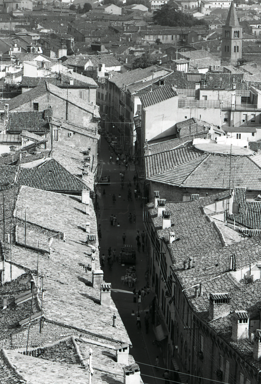 Servizio fotografico : Ferrara, 1974 / Paolo Monti. - Strisce: 6, Fotogrammi complessivi: 33 : Negativo b/n, gelatina bromuro d'argento/ pellicola ; 35 mm. - ((Sul portanegativi: N[I]K[MA]T PanF e iscrizione inventariale e didascalica manoscritta a penna nera "Ferrara - vedute dal Castello 17) e 18) dal campanile Duomo". - Occasione: Campagna di rilevamento del centro storico. - Fonte: Agenda di Paolo Monti: Leica 1501-3000 Controllo numerazione (1950-1978), presso Archivio Paolo Monti